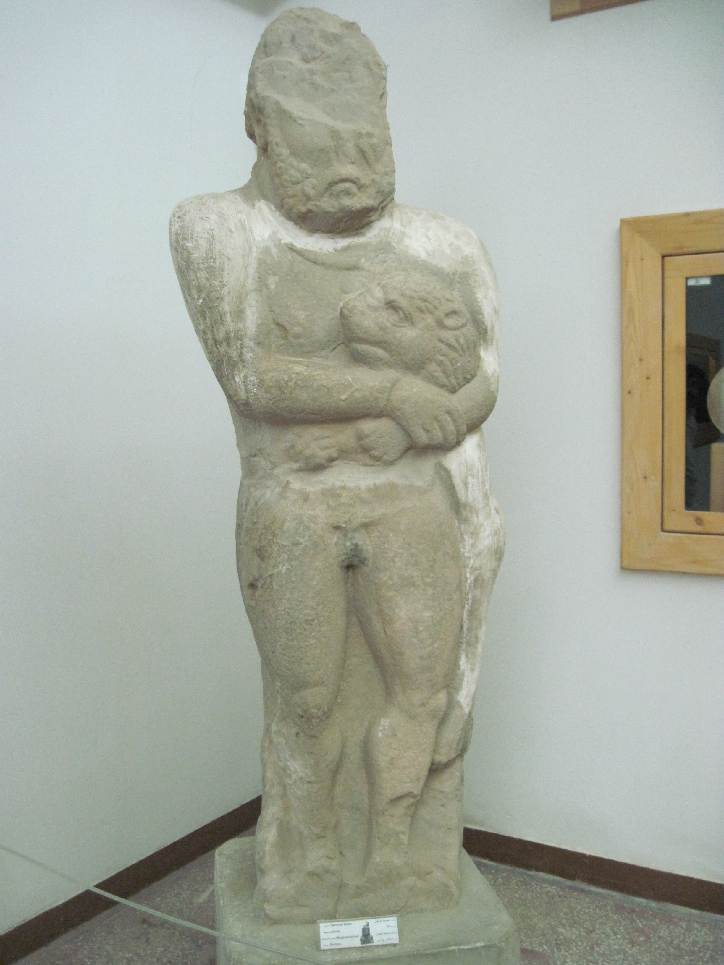 این مجسمه در موزه شوش قرار دارد و مربوط به دوره اشکانیان می‌باشد.